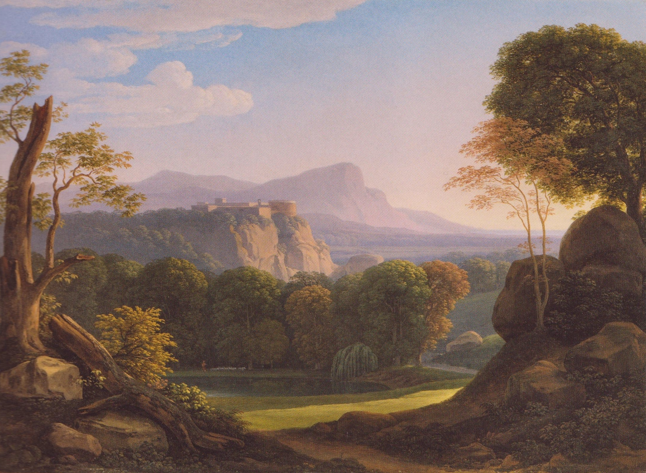 Italienische Landschaft mit Schloss auf einem Bergrücken, Öl auf Holz, 1804. 36,2 x 49 cm. Germanisches Nationalmuseum